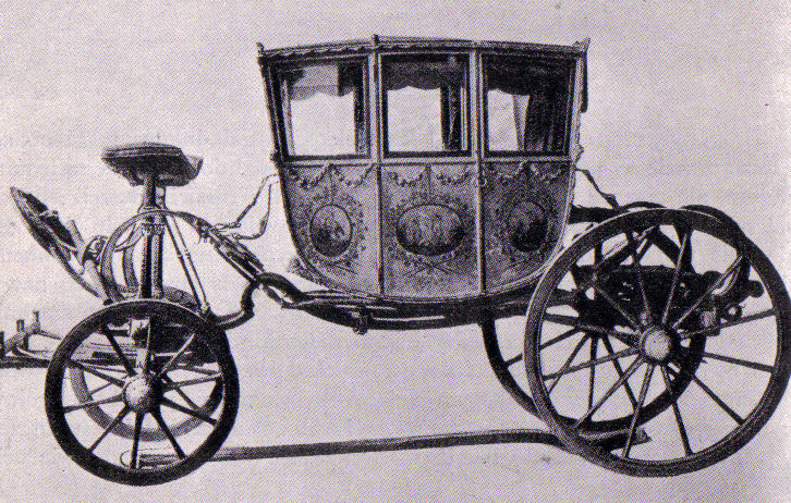 Karoca - rycina XVIII-wieczna